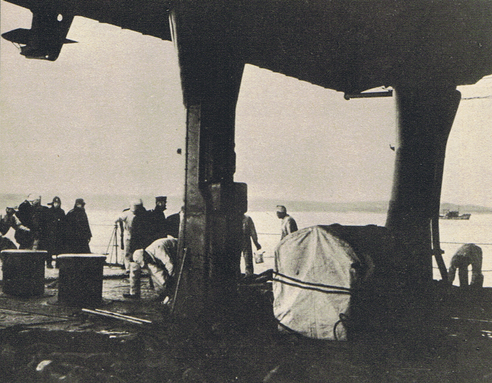 単冠湾を出発する『瑞鶴』。後甲板で碇を上げる水兵。 Japanese aircraft carrier Zuikaku just leaving Hitokappu Bay for Pearl Harbor. Sailors were winching up the anchor on the quarter-deck.